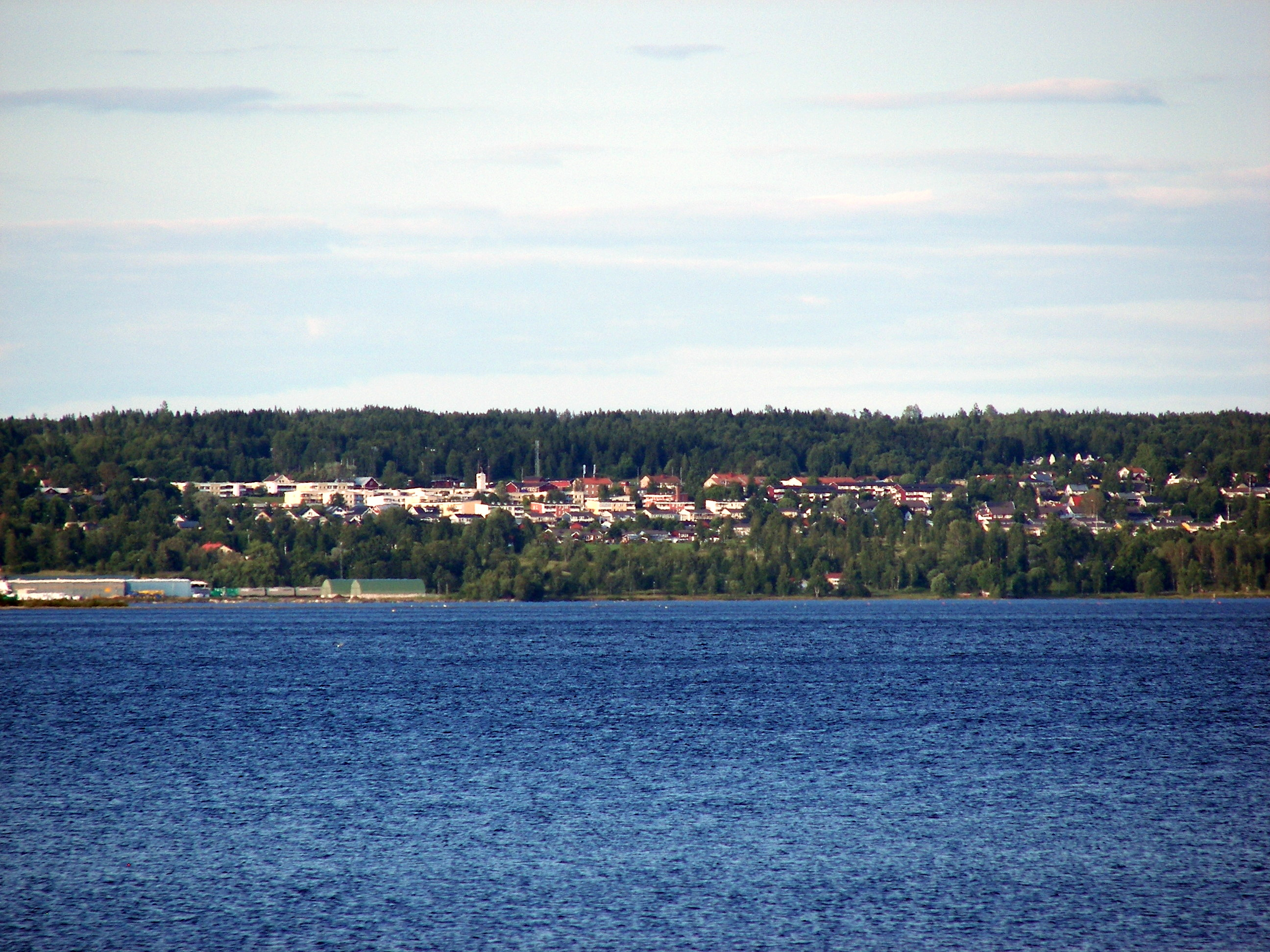 Söråkers centrala delar sett från Vivstavarv i Timrå.